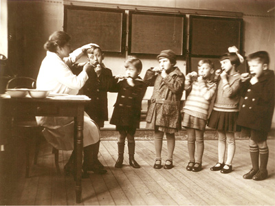 Jeugdgezondheidszorg poetsinstructie jaren'30